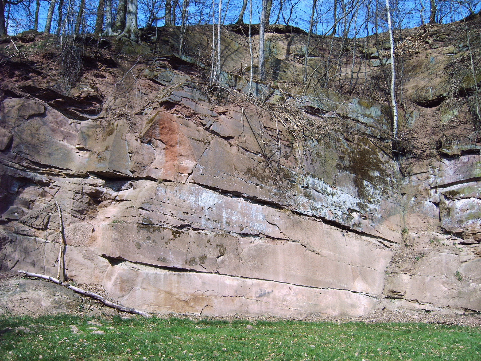 Aufschluss im Solling-Vogler